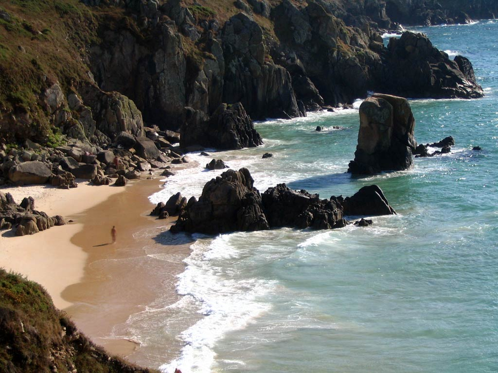 Praia de Lumebo. Ferrol